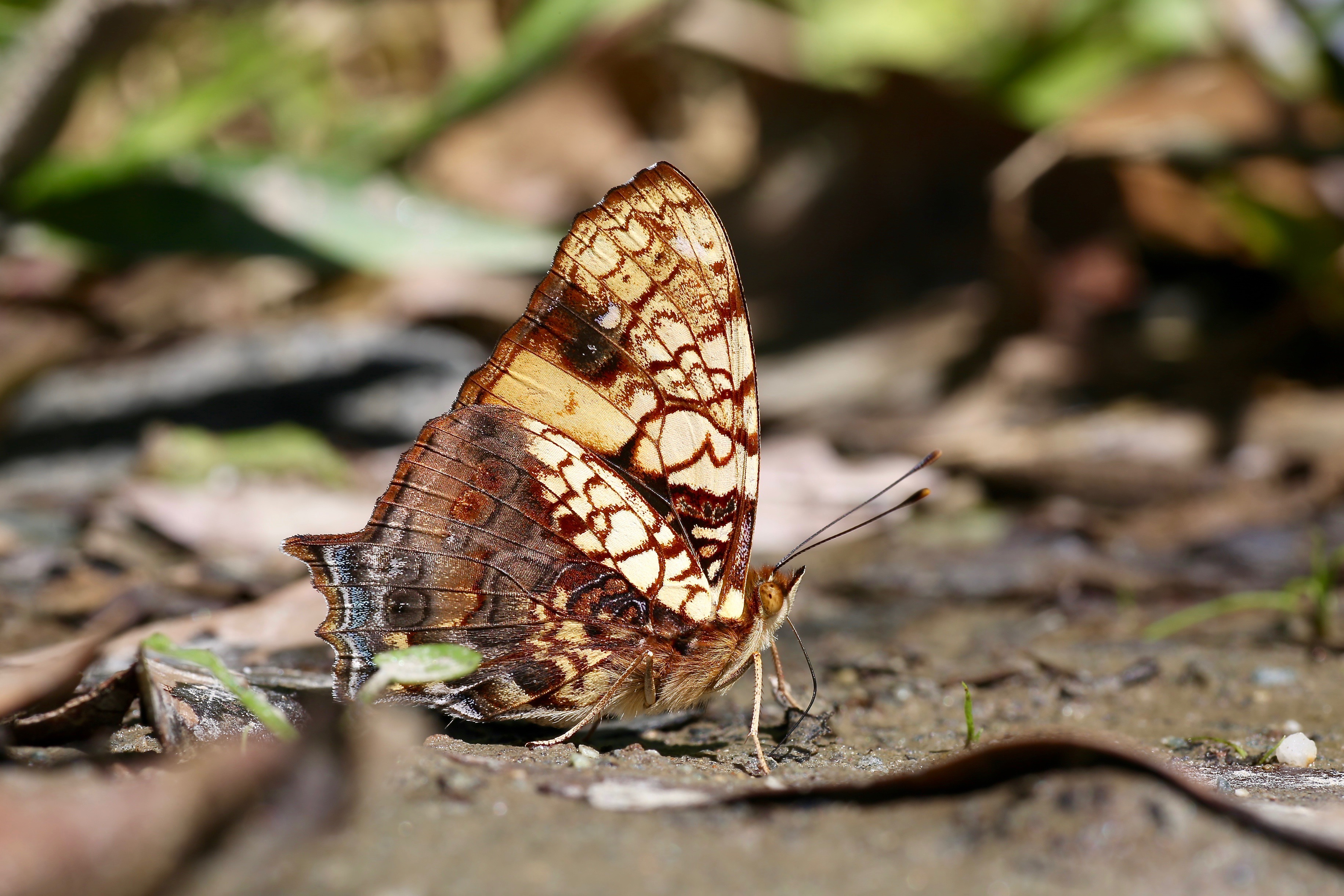 Ecuador, Tungurahua, El Topo, Río Zuñag.